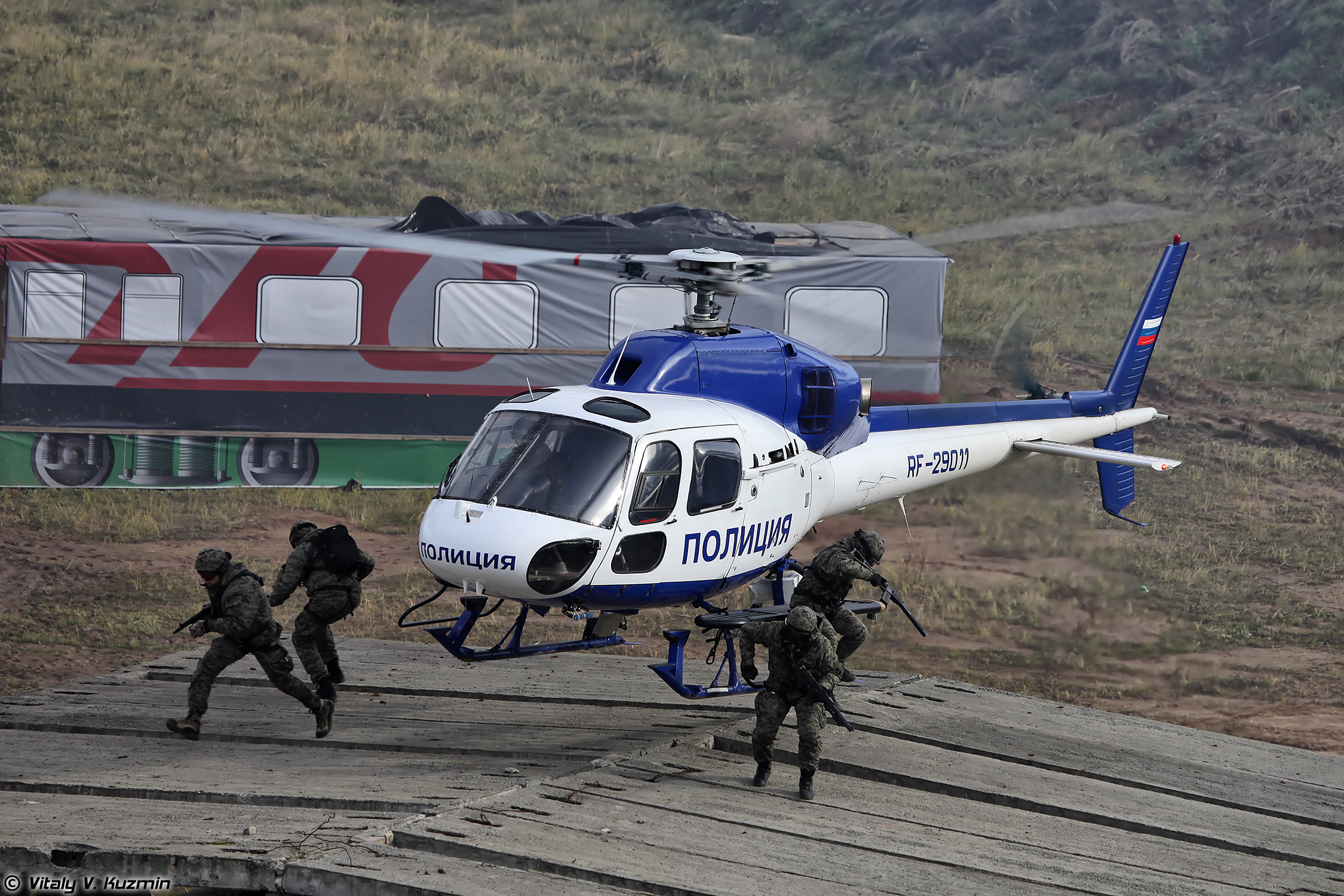 Высадка штурмовой группы СОБР Рысь на крышу здания (First assault group from SOBR Rys' was landed on the roof)